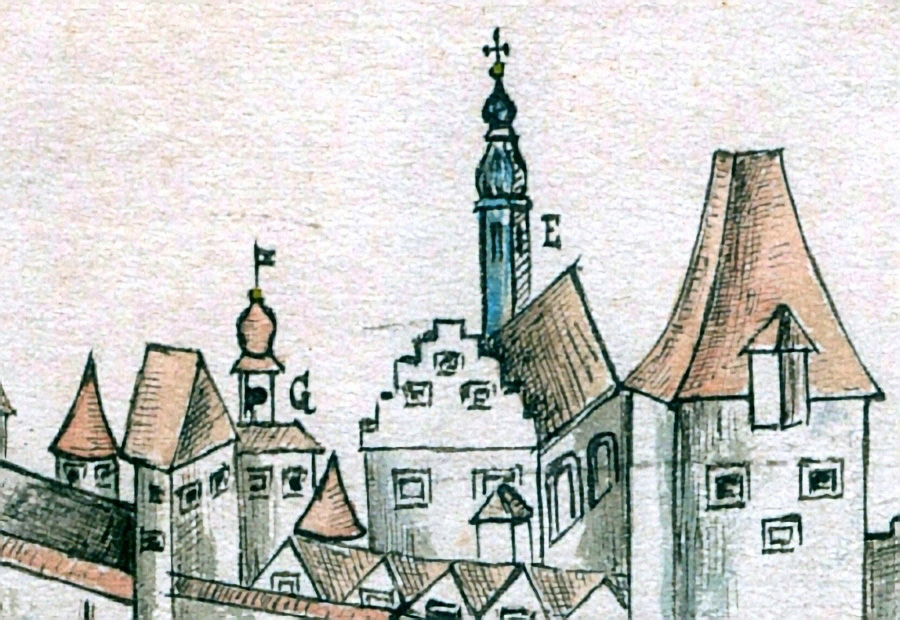 špitální kostel svatého Václava na vedutě v roce 1785, poblíž křižovatky Krajinské a Hradební, Č. Budějovice